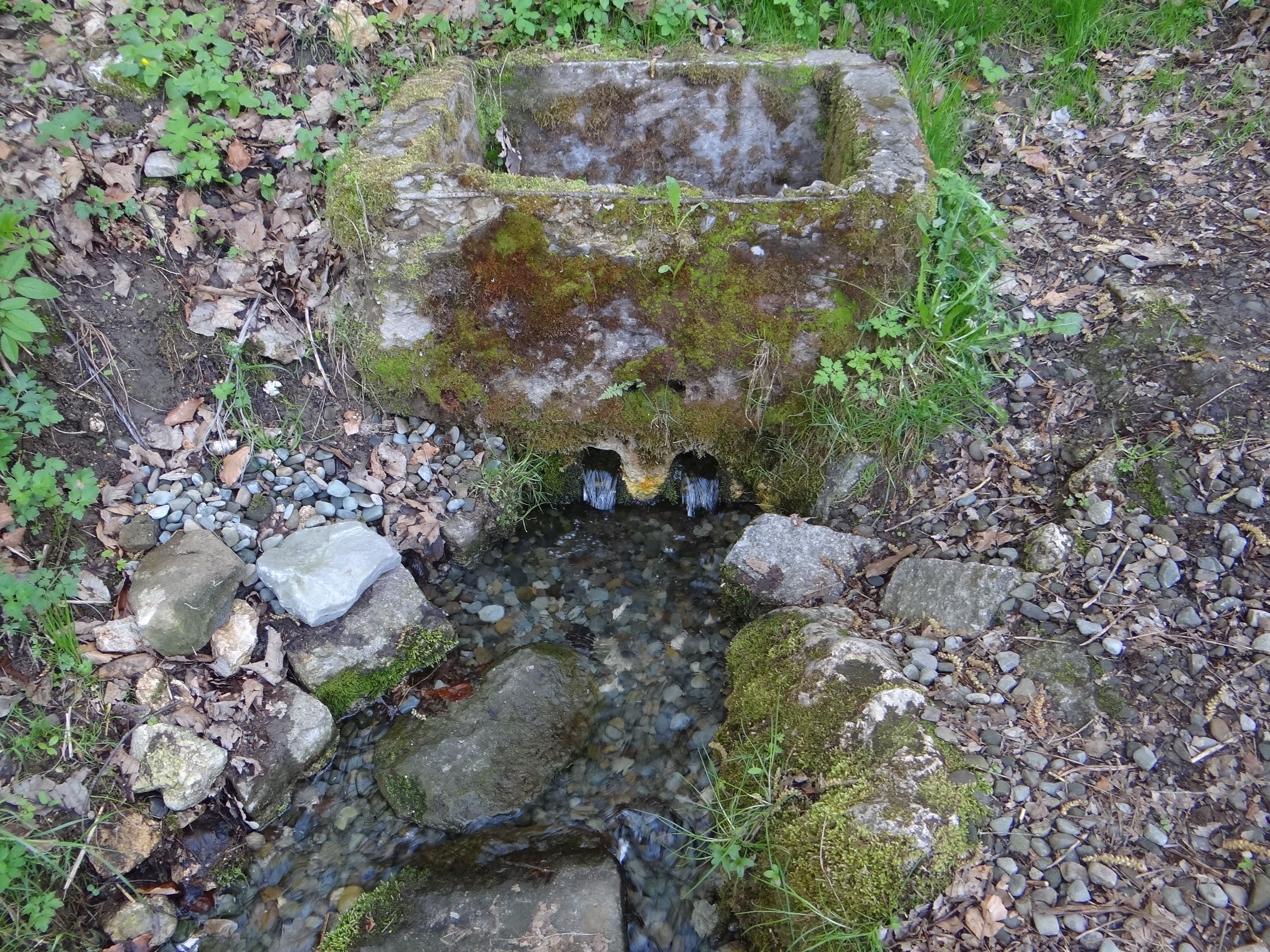 Źródło nad Orczykiem w Sułoszowej